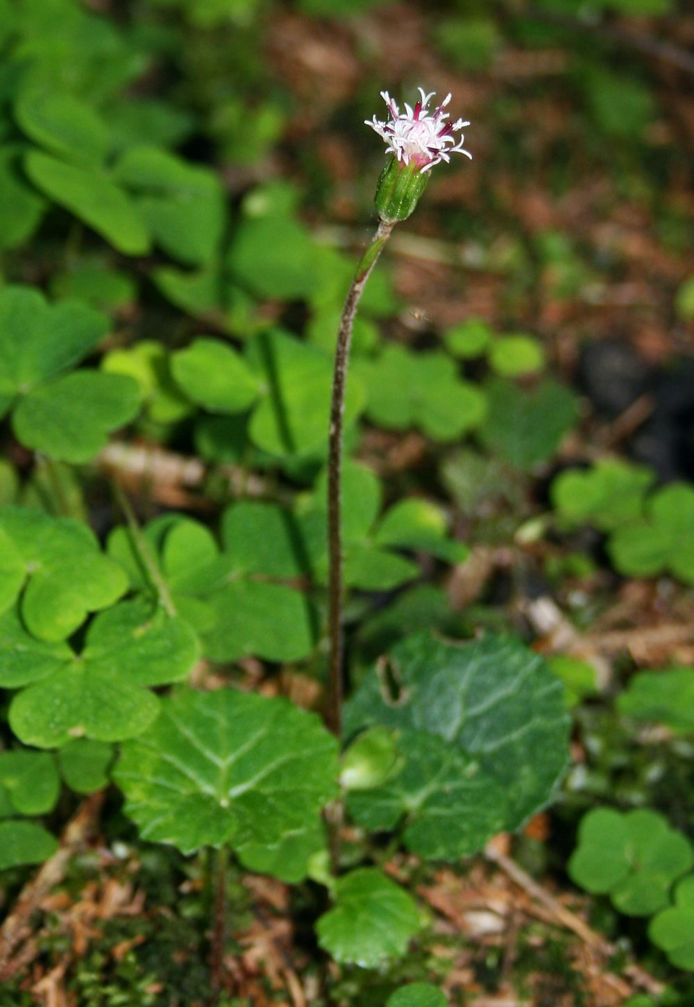 Alpen-Brandlattich (Homogyne alpina), Korbblütler (Asteraceae) – Österreich/Austria/Autriche: Tirol, Kitzbüheler Alpen, Jochbergwald ca. 2,5 km N Pass Thurn, ca. 1060 m